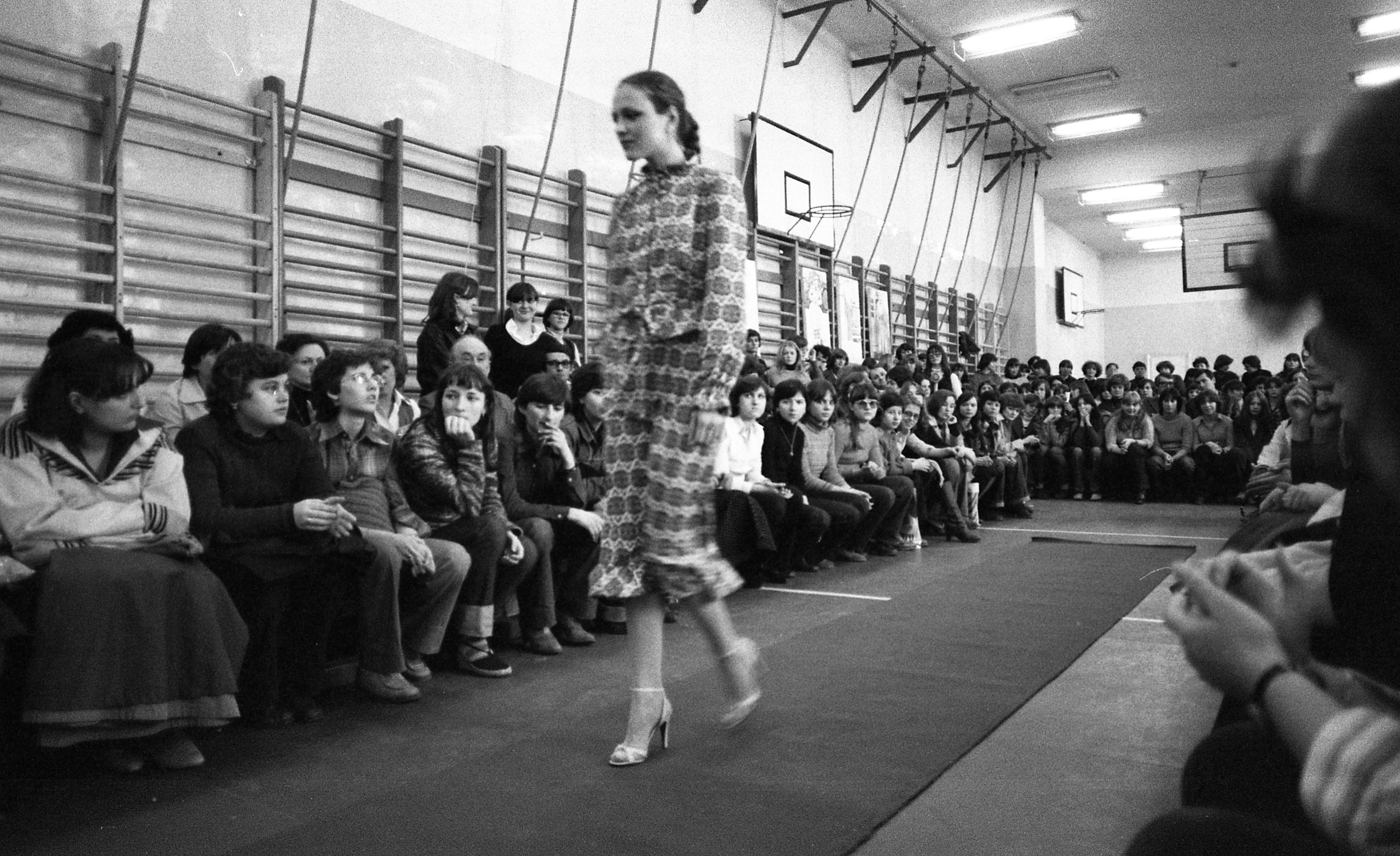 Rákóczi tér 4., Varga Katalin Ruhaipari Szakközépiskola. Location: Hungary, Budapest VIII. Tags: Budapest Title: Rákóczi tér 4., Varga Katalin Ruhaipari Szakközépiskola.